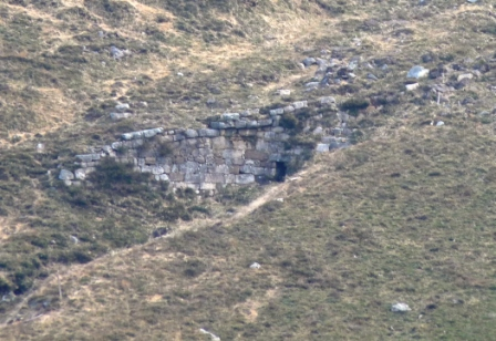 Servia para dejar pasar el agua y que esta no se acumulase dañando la estructura